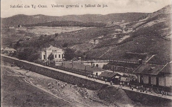 Salina de Jos şi Salina de Sus de la Târgu Ocna. De remarcat ascensorul aflat în vârful dealului